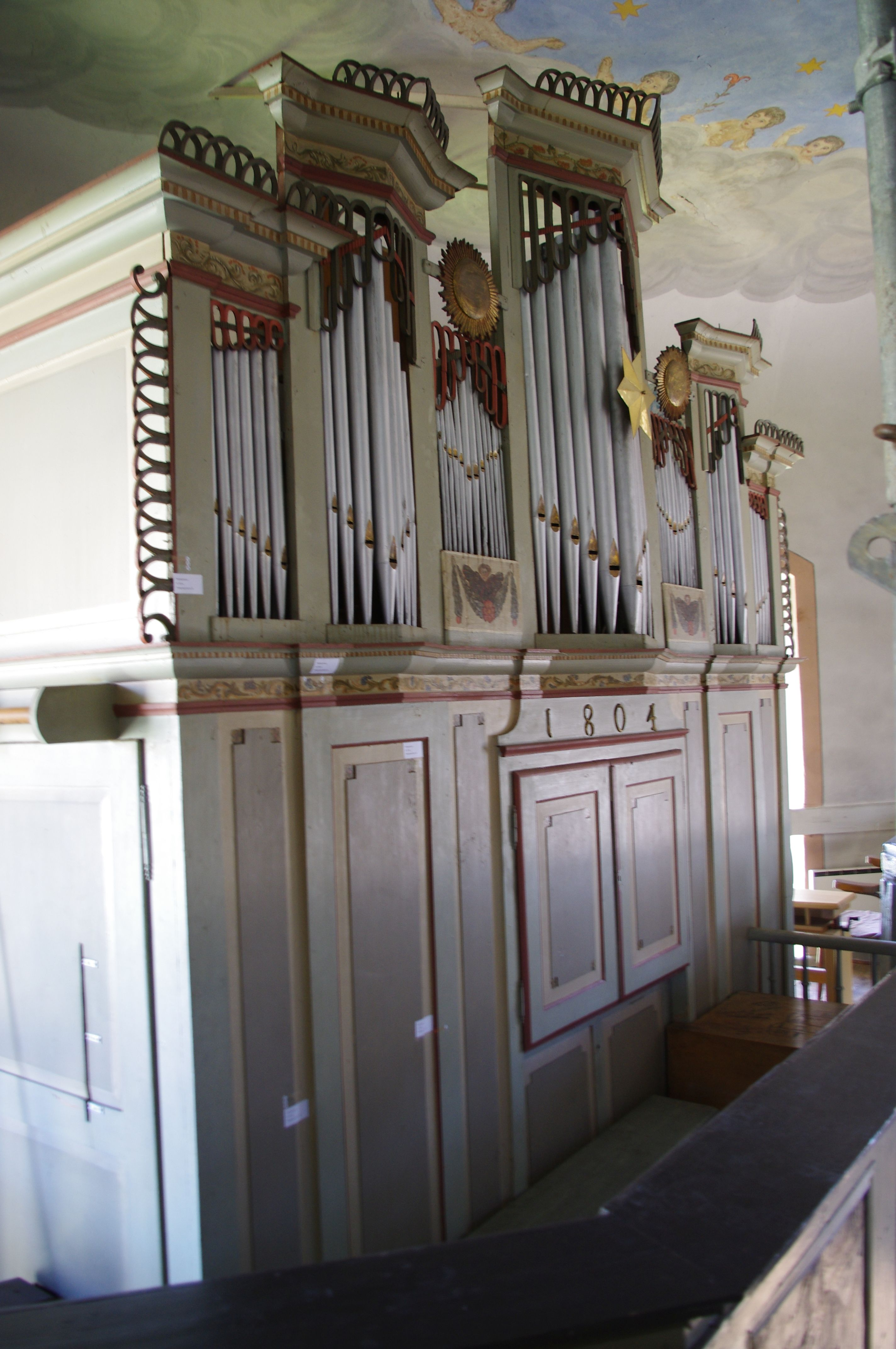 Orgel der ev. Kirche Rüddingshausen